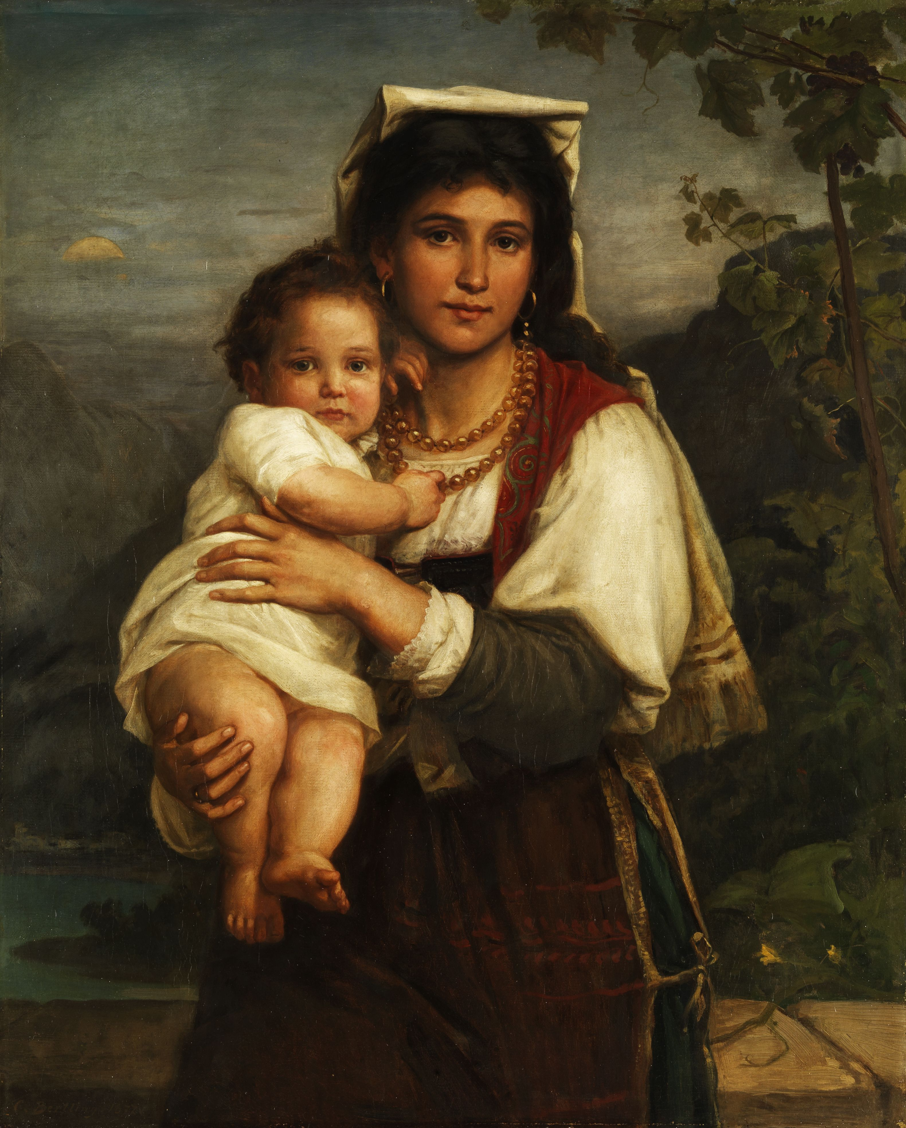 Junge Römerin mit Kind. Öl auf Leinwand. 74 x 61 cm.